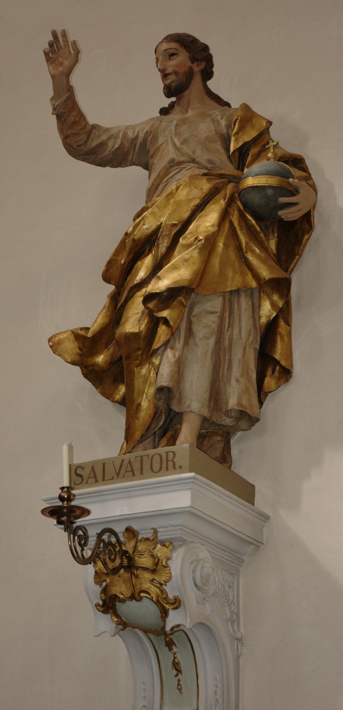 St. Vitus Ellwangen, Salvator Mundi